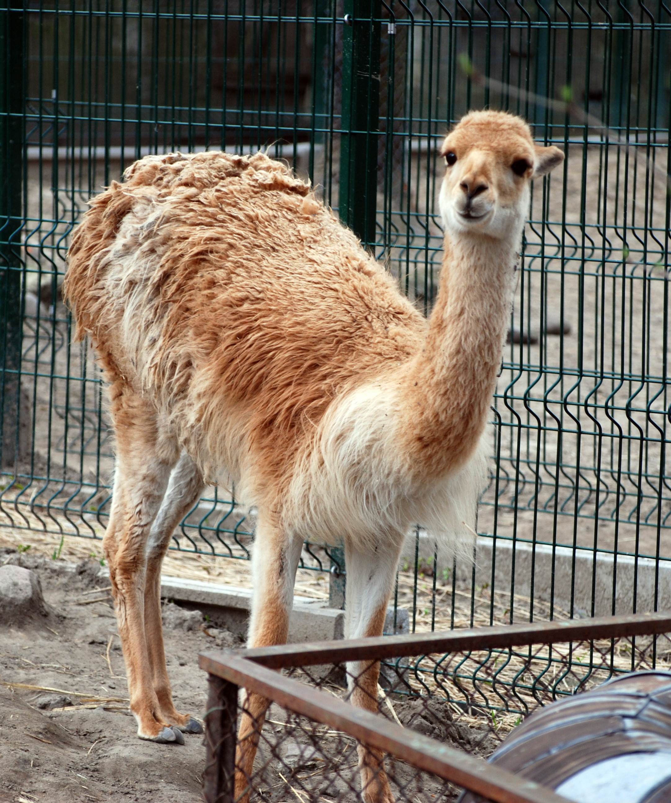 Adult male Vicugna vicugna in Łódź Zoo